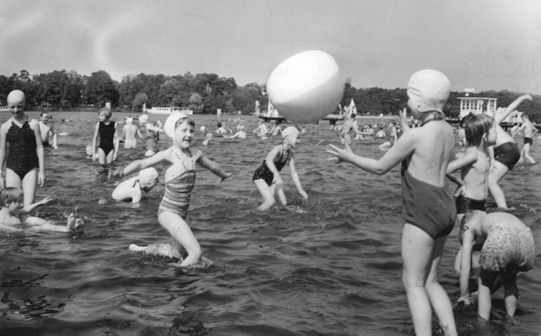 Berlin, Seebad Grünau Zentralbild Zühlsdorf 7.6.1960 Berlin: Pfingsten im Grünen. Die warme Witterung während der Pfingstfeiertage hatte zehntausende Berliner zu Ausflügen in die bekannten Erholungsgebiete rund um Berlin gelockt. Ihre erste Jahresbesucherspitze erlebten vor allem die Berliner Freibäder. UBz: Vergnügtes Treiben im Seebad Grünau.